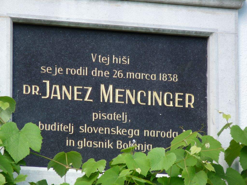 Janez Mencinger, spominska plošča na rojstni hiši.[1]